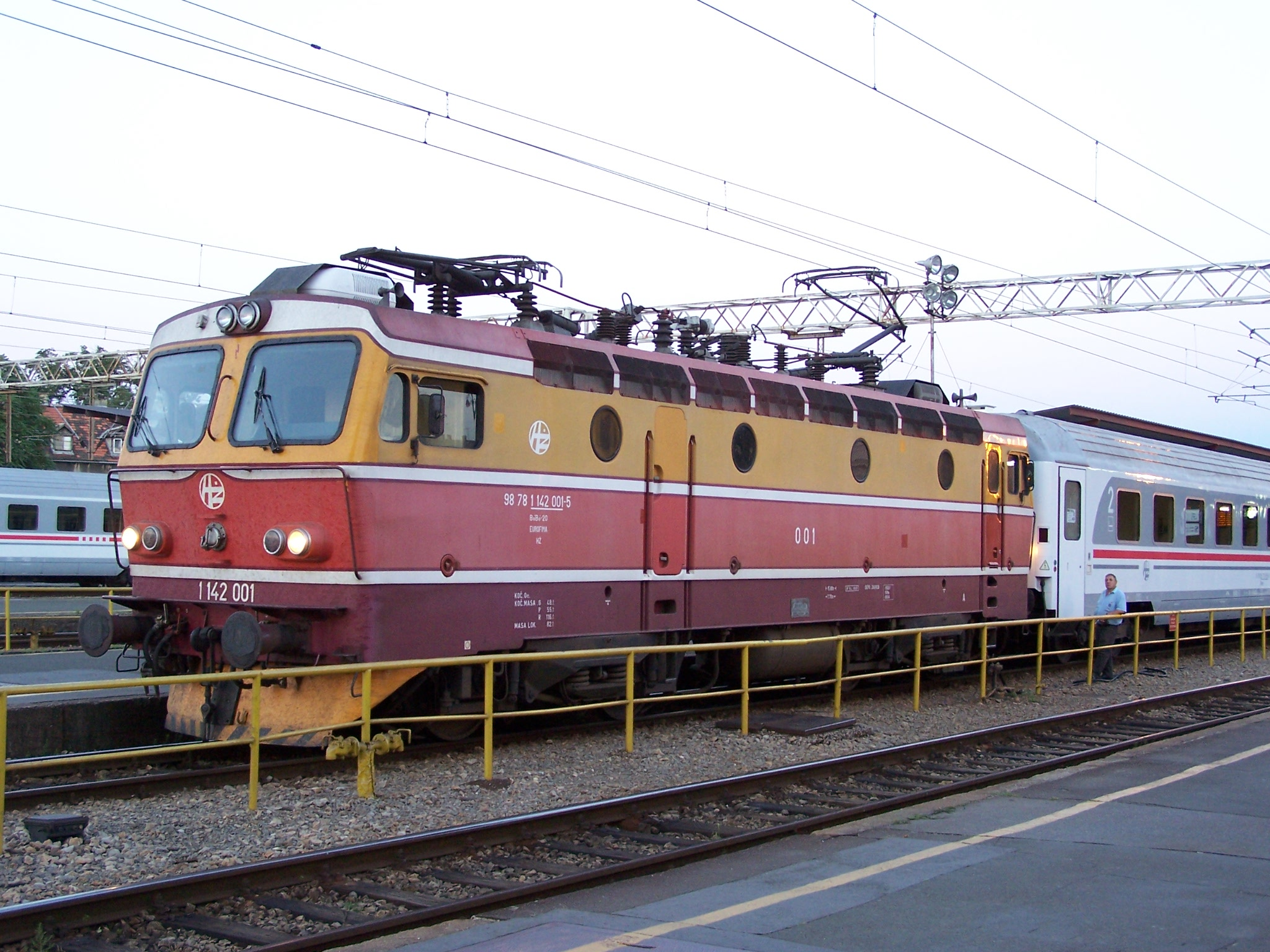 HŽ 1142